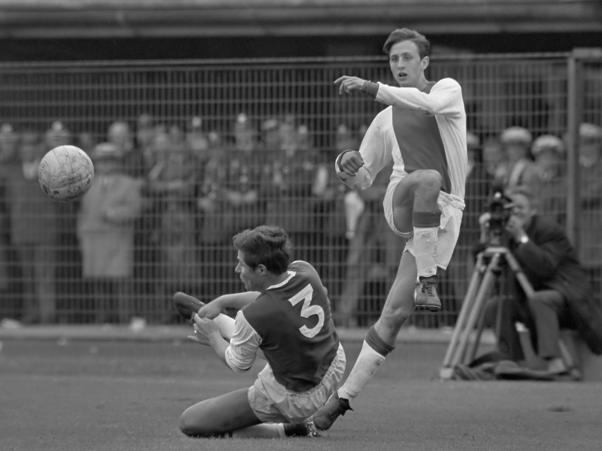 Feyenoord tegen Ajax 1-0. Nummer 26 Israel in duel met Cruijff 3 september 1967